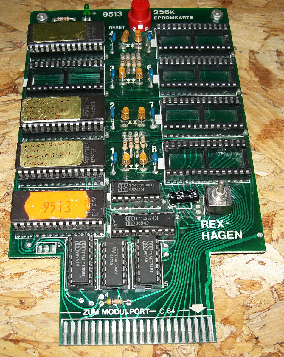 256kByte EPROM-Karte Commodore 64